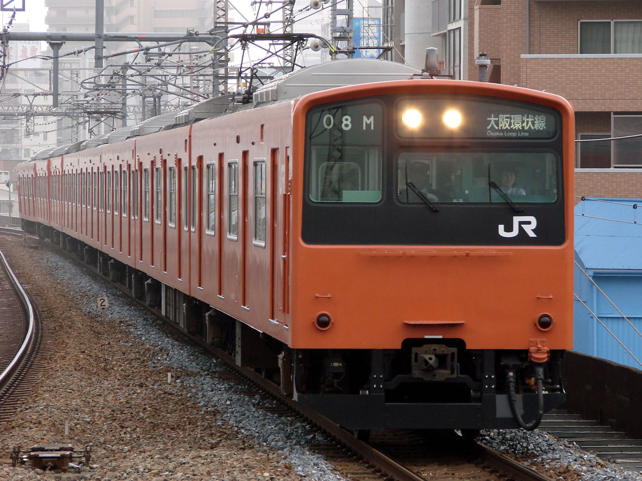 JR西日本 森ノ宮電車区201系（野田－福島）